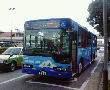 千葉シーサイドバス 大型ワンステップ車両（三菱ふそう・エアロスター：PJ-MP35JM改） 幕張本郷駅にて